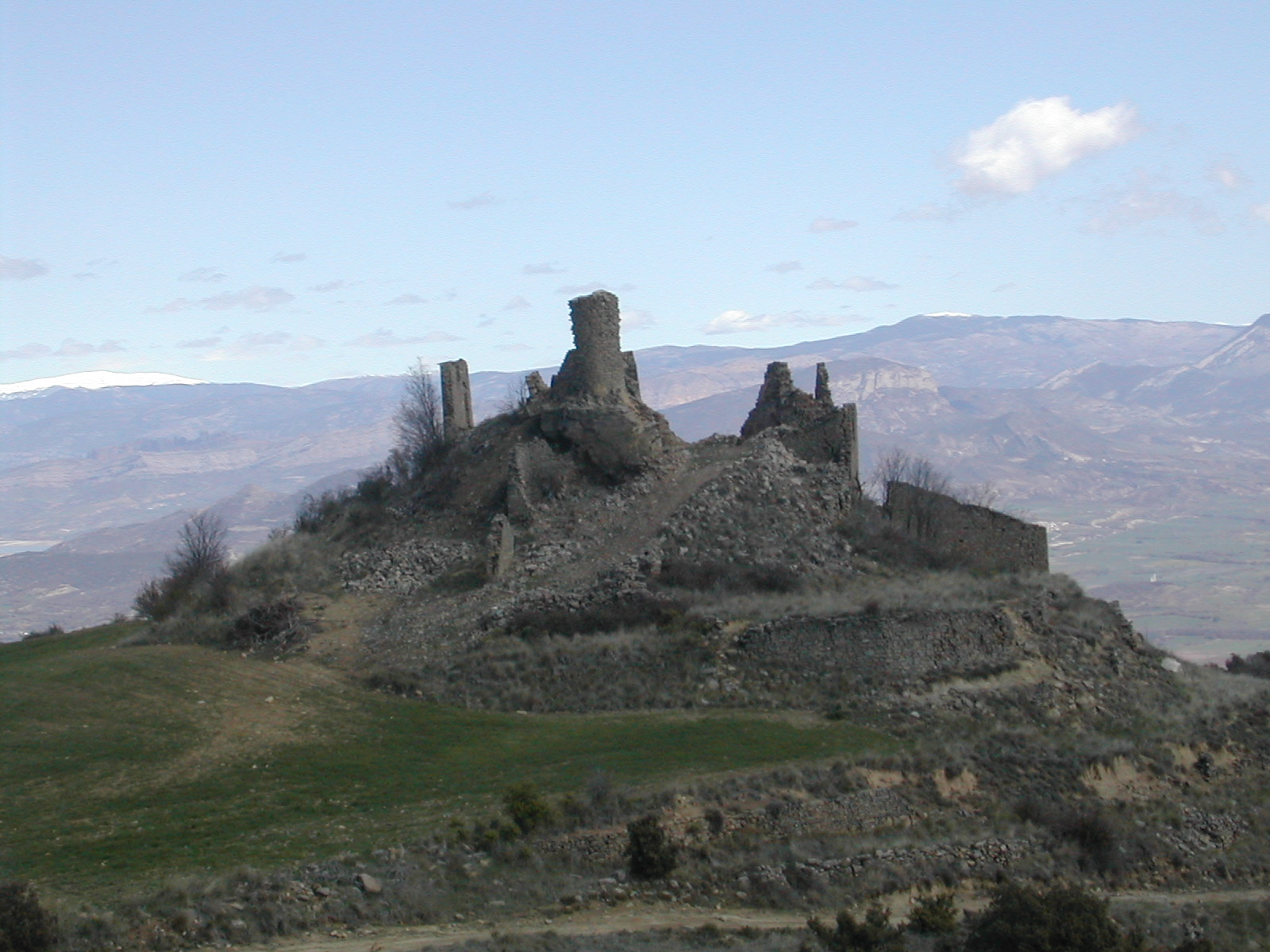 Restes de l'antic poble de Miravet, a l'actual municipi de Castell de Mur (Pallars Jussà).